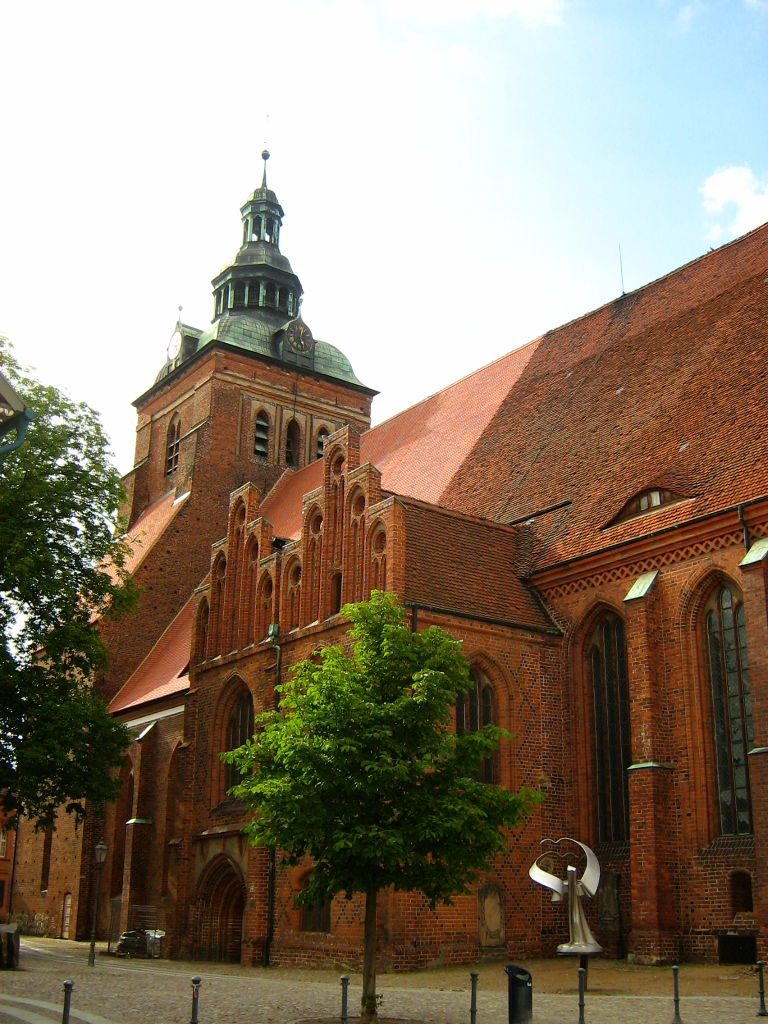 Wittstock/Dosse: St. Marienkirche. Diese Kirche ist eine kreuzrippengewölbte gotische Backsteinhallenkirche. Der Turm und der Westteil des Langhauses stammen aus der zweiten Hälfte des 13. Jh. Die barocke Haube erhielt der Turm 1704. Zur Innenausstattung gehören ein spätgotischer Flügelaltar von Claus Berg mit der “Wittstocker Madonna”, ein spätgotisches Sakramentshäuschen, eine barocke Holztaufe und eine Schukeorgel mit 3575 Pfeifen.